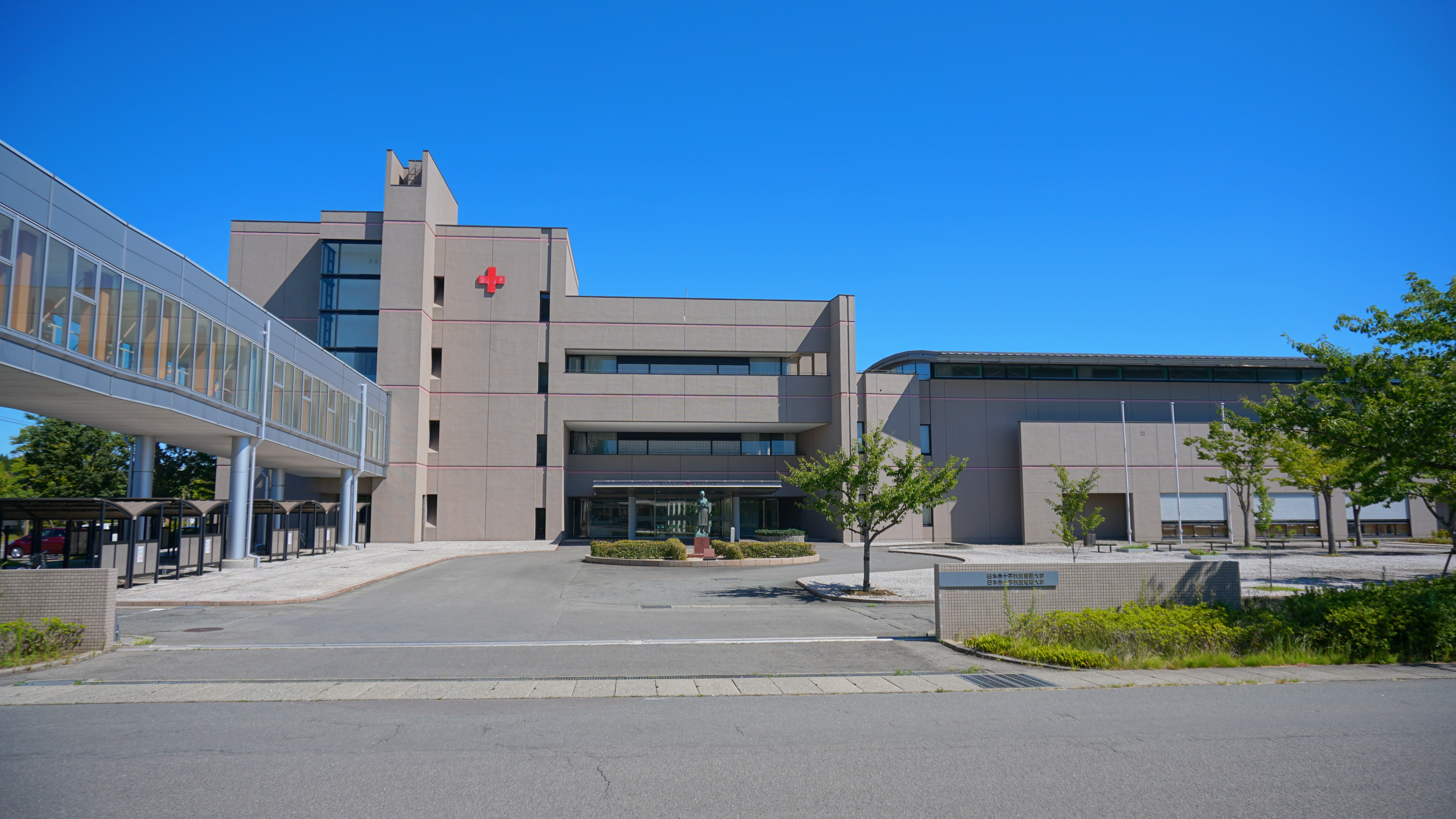 日本赤十字秋田看護大学・日本赤十字秋田短期大学